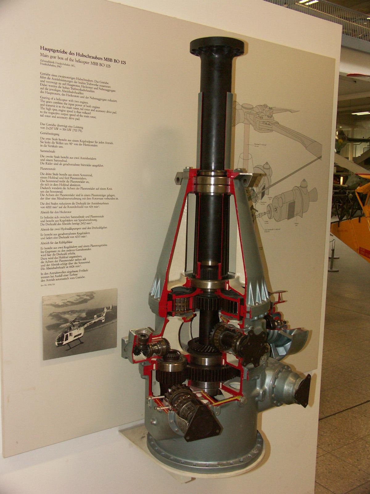 Photo J-P Donzey Bo 105 in Deutsches Museum Munich